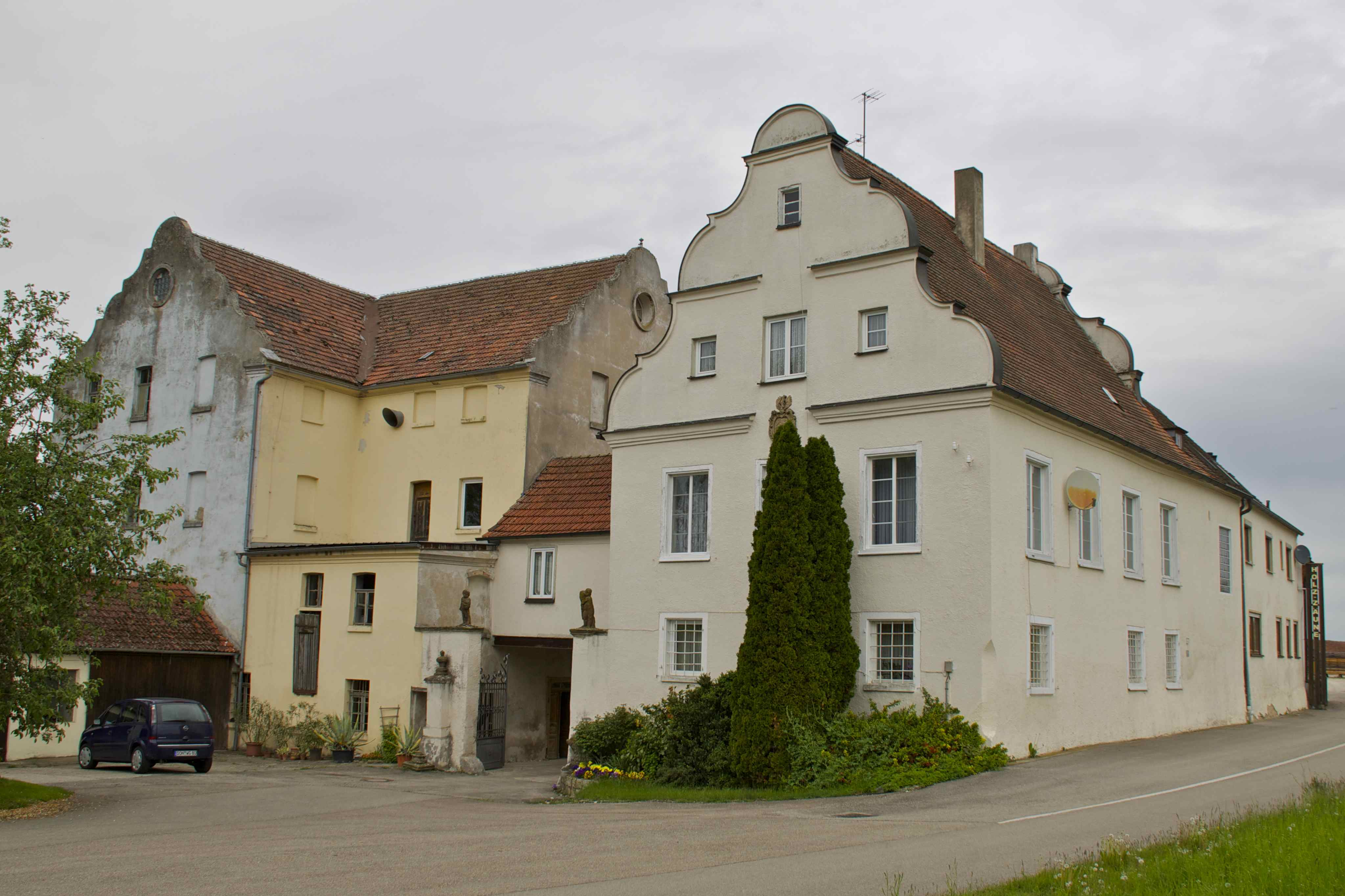 Aumuehle_Hainsfarth